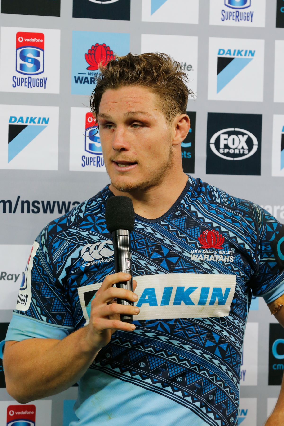 2017.07.08.21.44.17-Michael Hooper